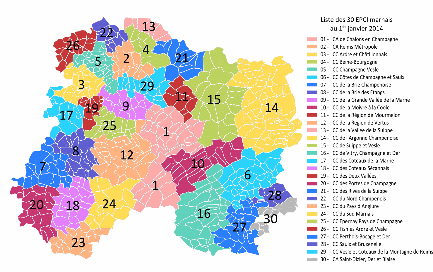 Carte des intercommunalités du département de la Marne au 1er janvier 2014